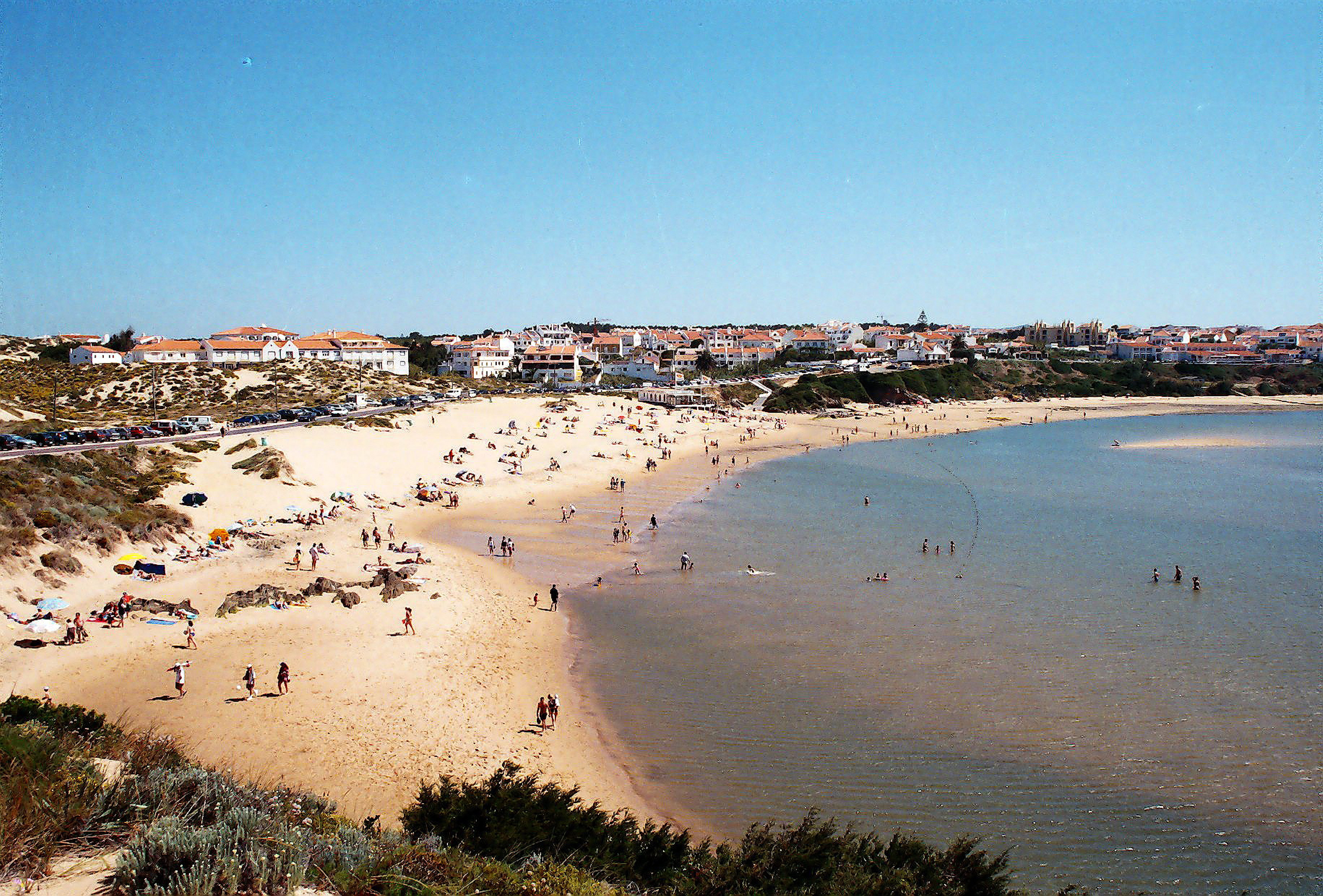 Vila Nova de Milfontes - Odemira Fotografia de Vitor Oliveira, integrada na colecção com o endereço